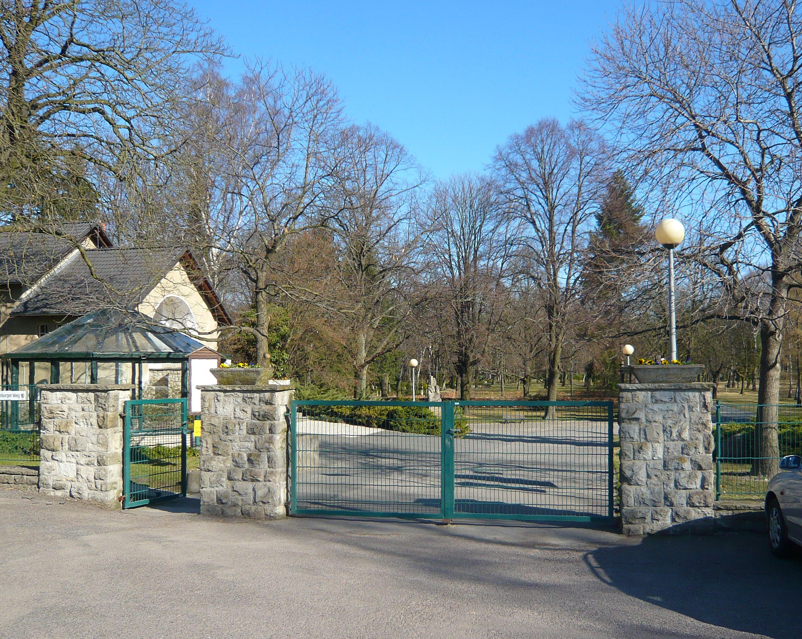 Ortsteil Marzahn: Parkfriedhof Wiesenburger Weg, Eingang